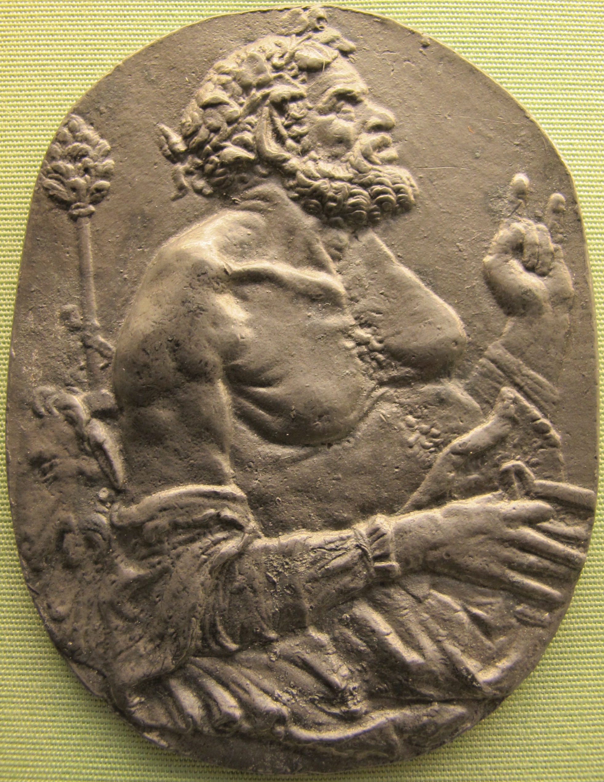 Artista del nord italia, satiro con una coppa e un tirso, fine del 15mo sec.